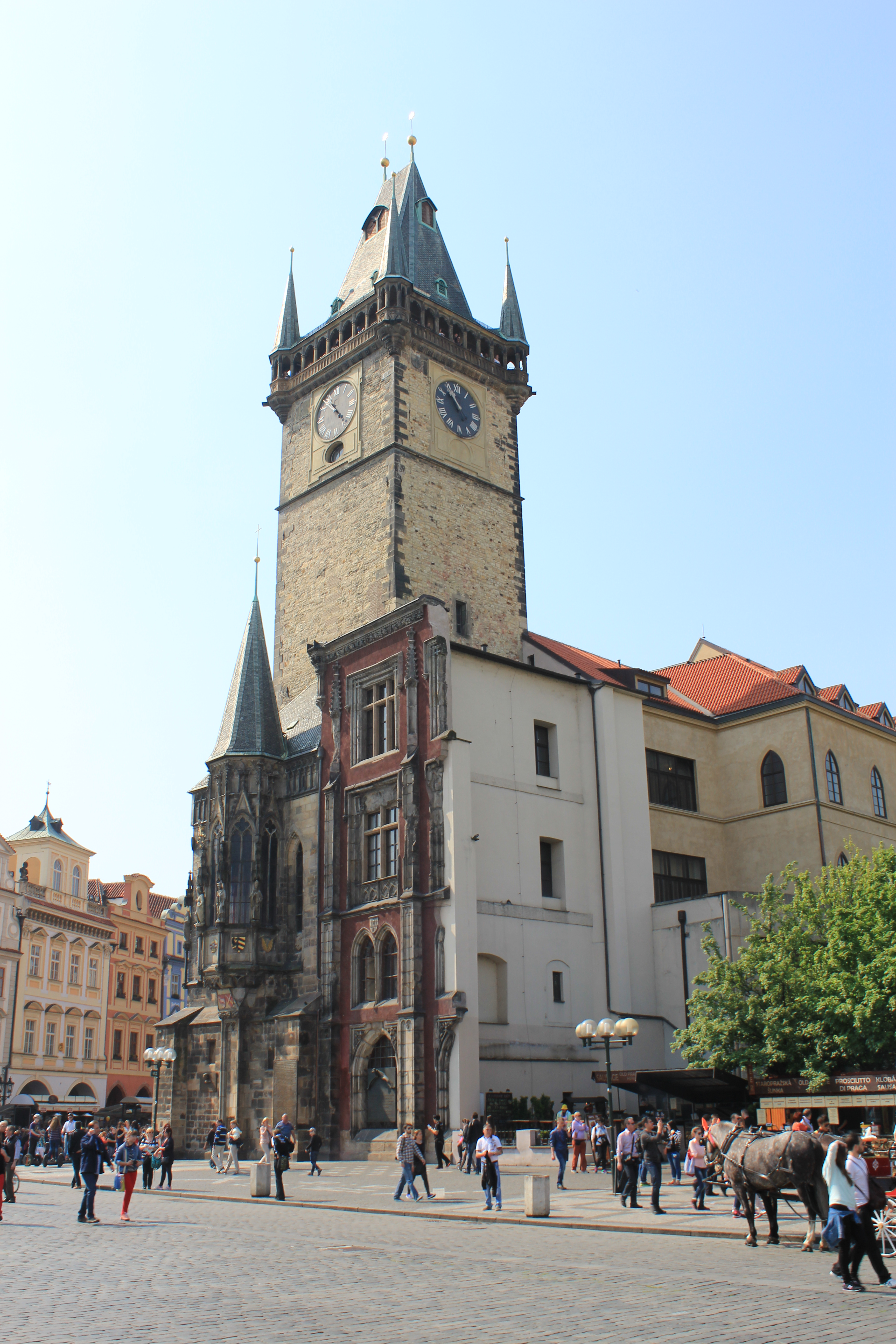 Rådhustårnet